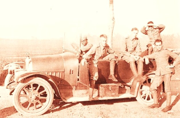 foto. Een groep militairen van het KNIL met een auto